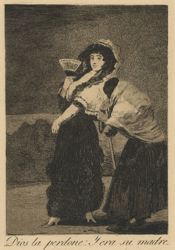 Capricho nº 16: Dios la perdone. Y era su madre de Goya, serie Los Caprichos